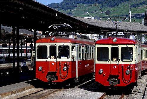 Bahnhof Vevey mit älteren Triebzügen "Les Pléiades"